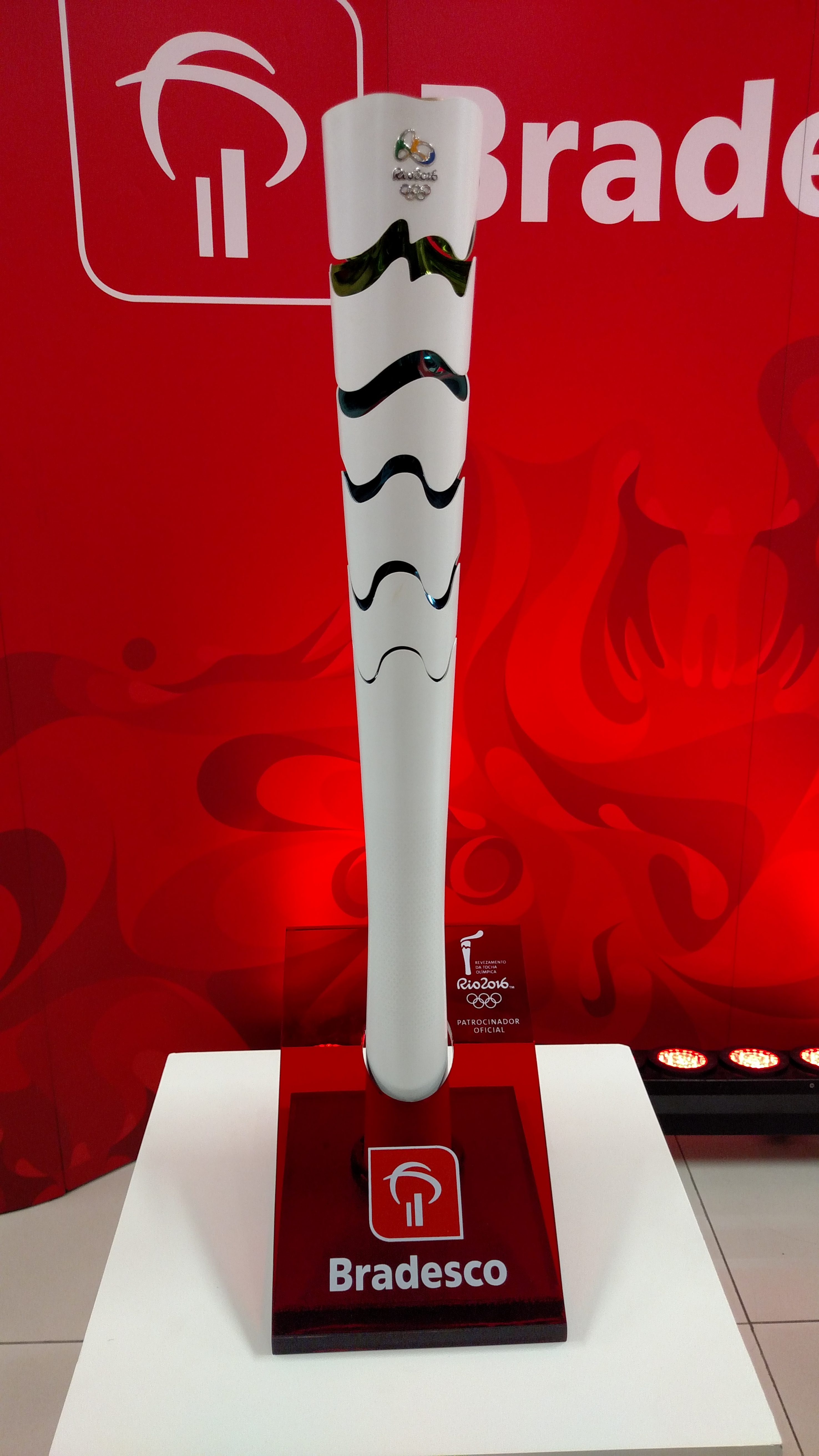 Tocha Olímpica exposta durante o revezamento em Niterói numa agência do Bradesco.